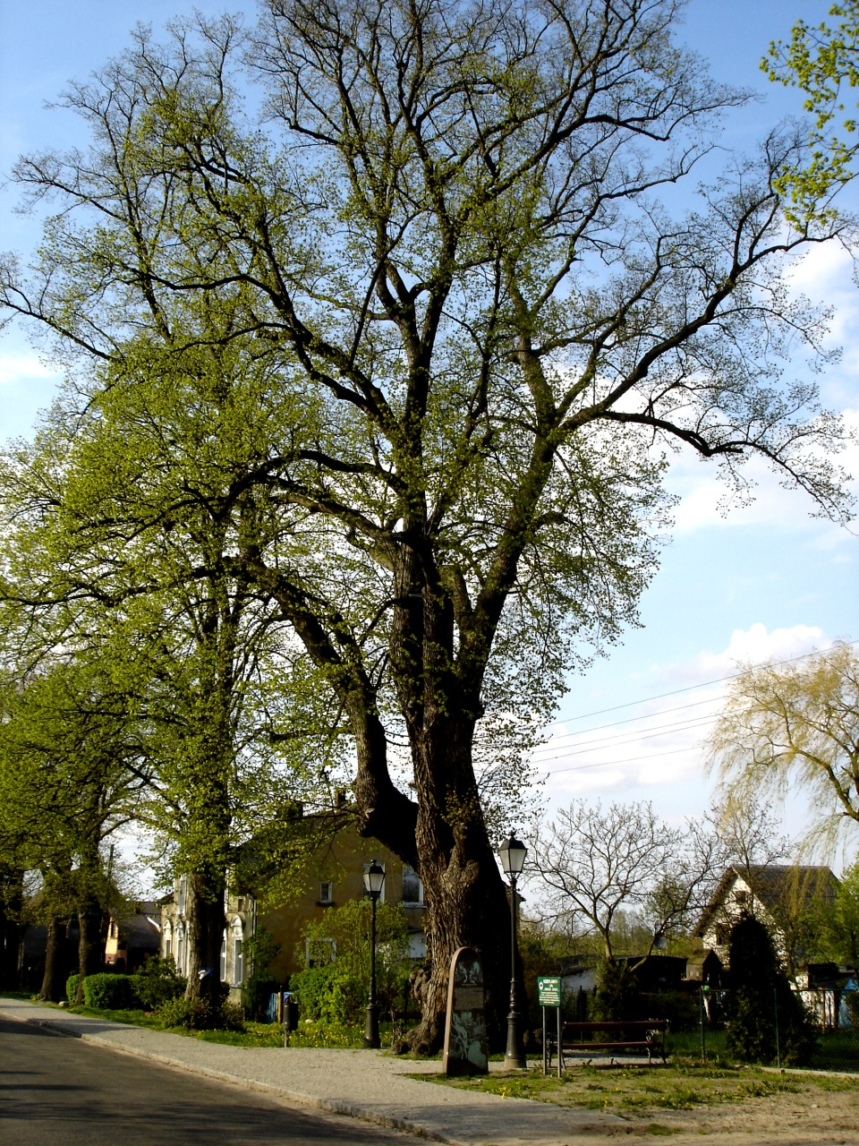 Kobylanka, Tilia "Wieniec Zgody", (Stargard County), Poland